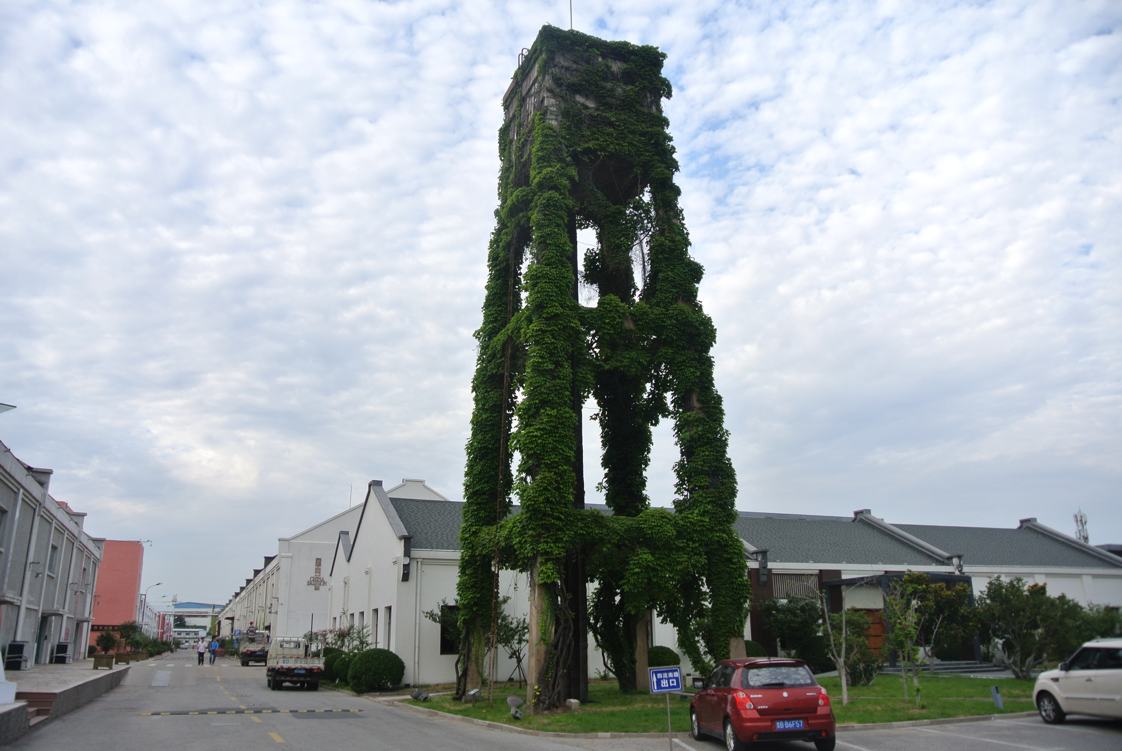 青岛国棉五厂水塔